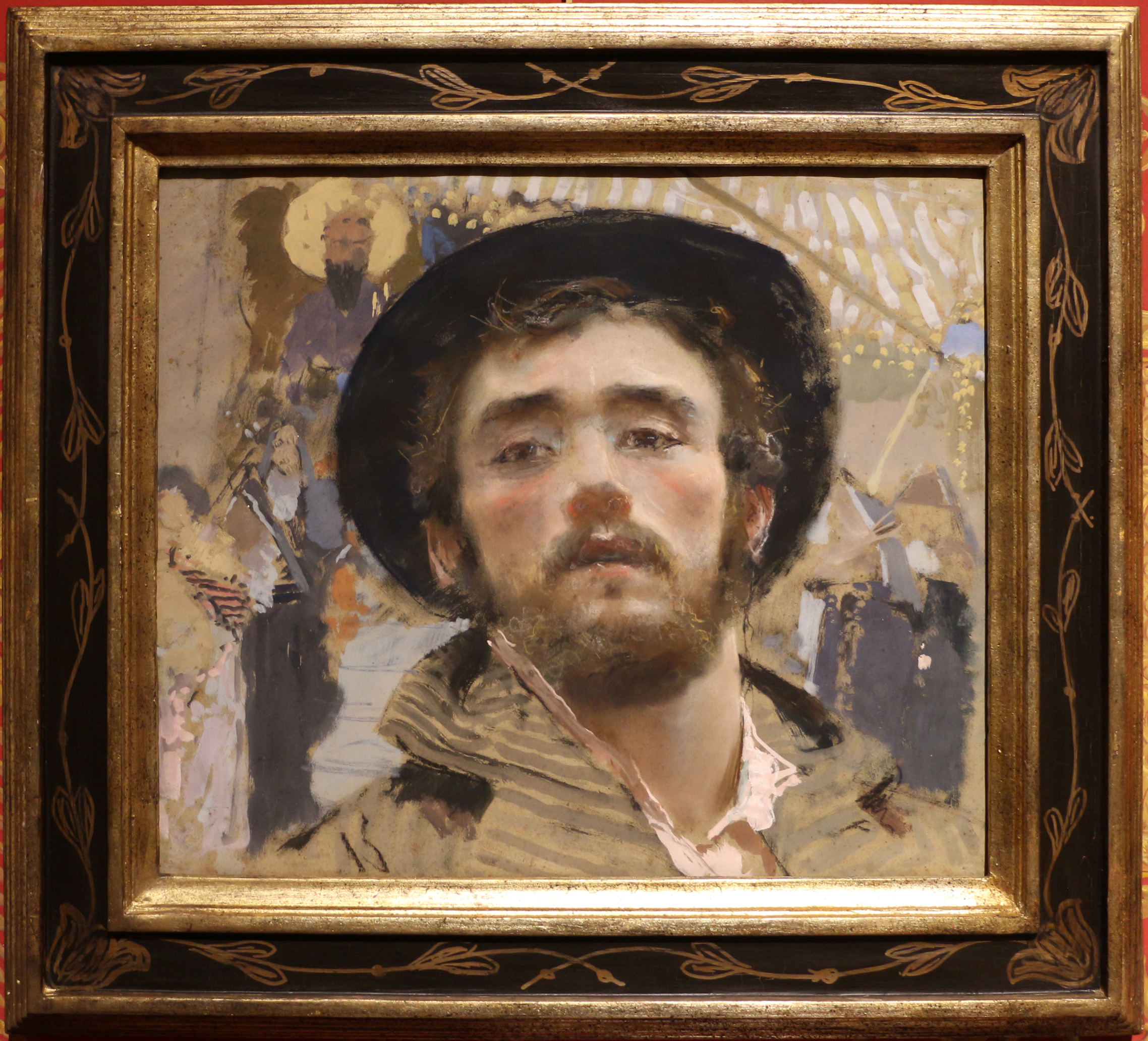 Self-portrait